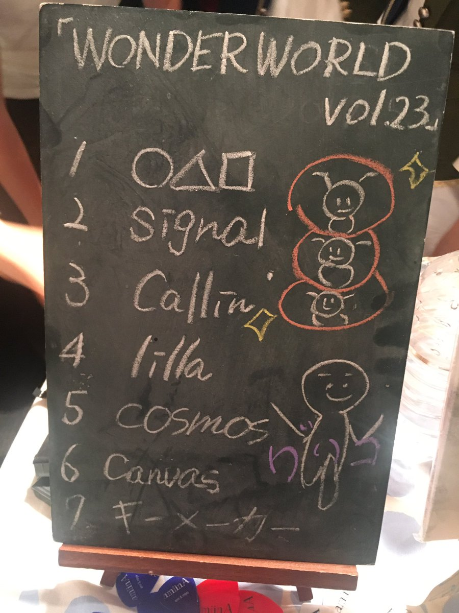 amiinAセトリボード(20170527(1))